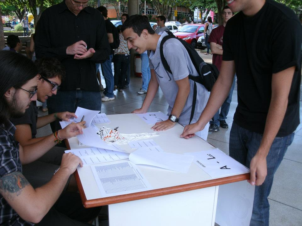 Estudantes chegam para palestra da Wikimedia